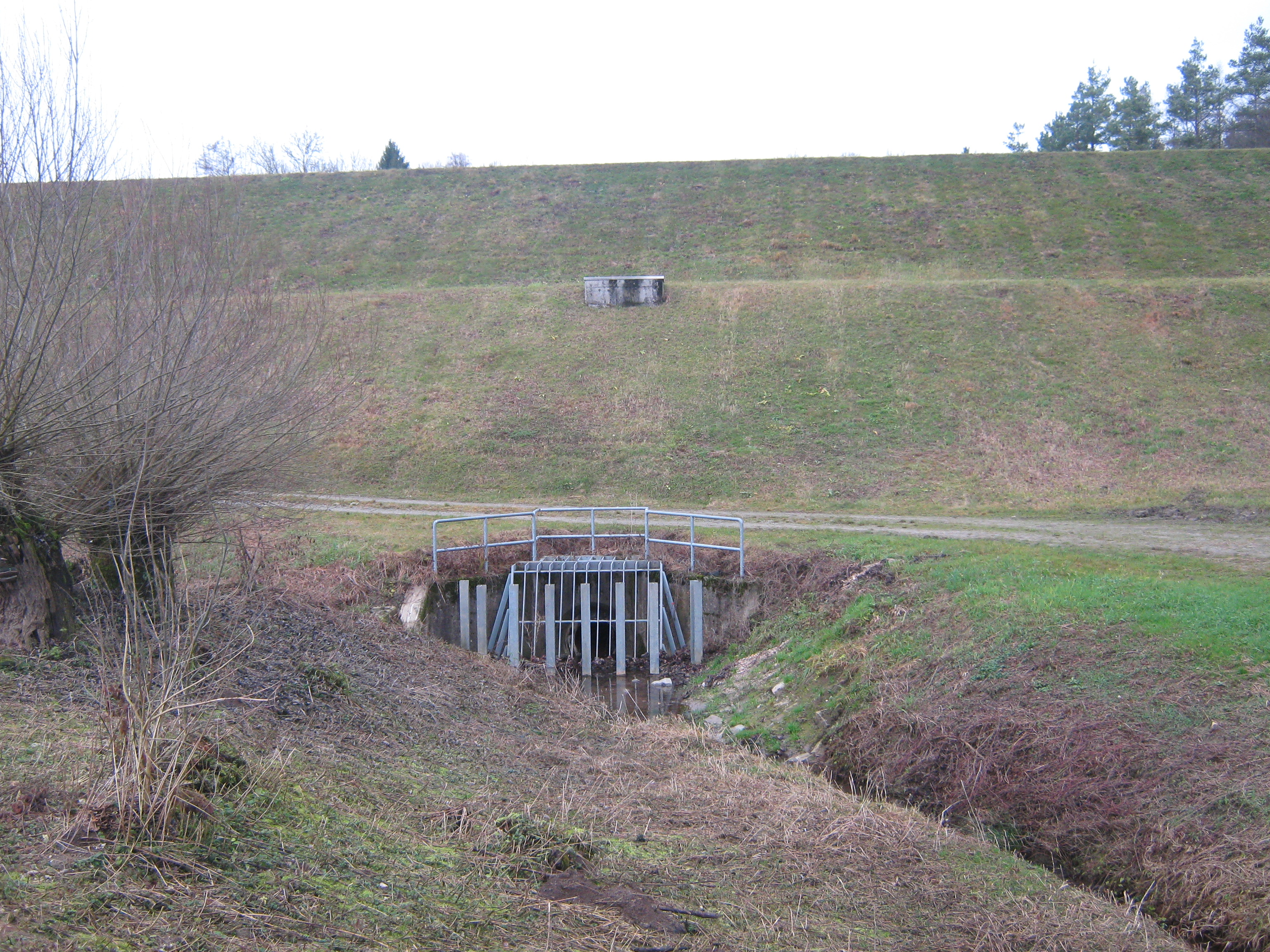 Hochwasserrückhaltebecken Asenbach, Dingolfing, Bayern: Wasserseitige Böschung (Südseite) des Damms, unterhalb davon das Einlaufbauwerk des Grundablasses mit Treibgutrechen